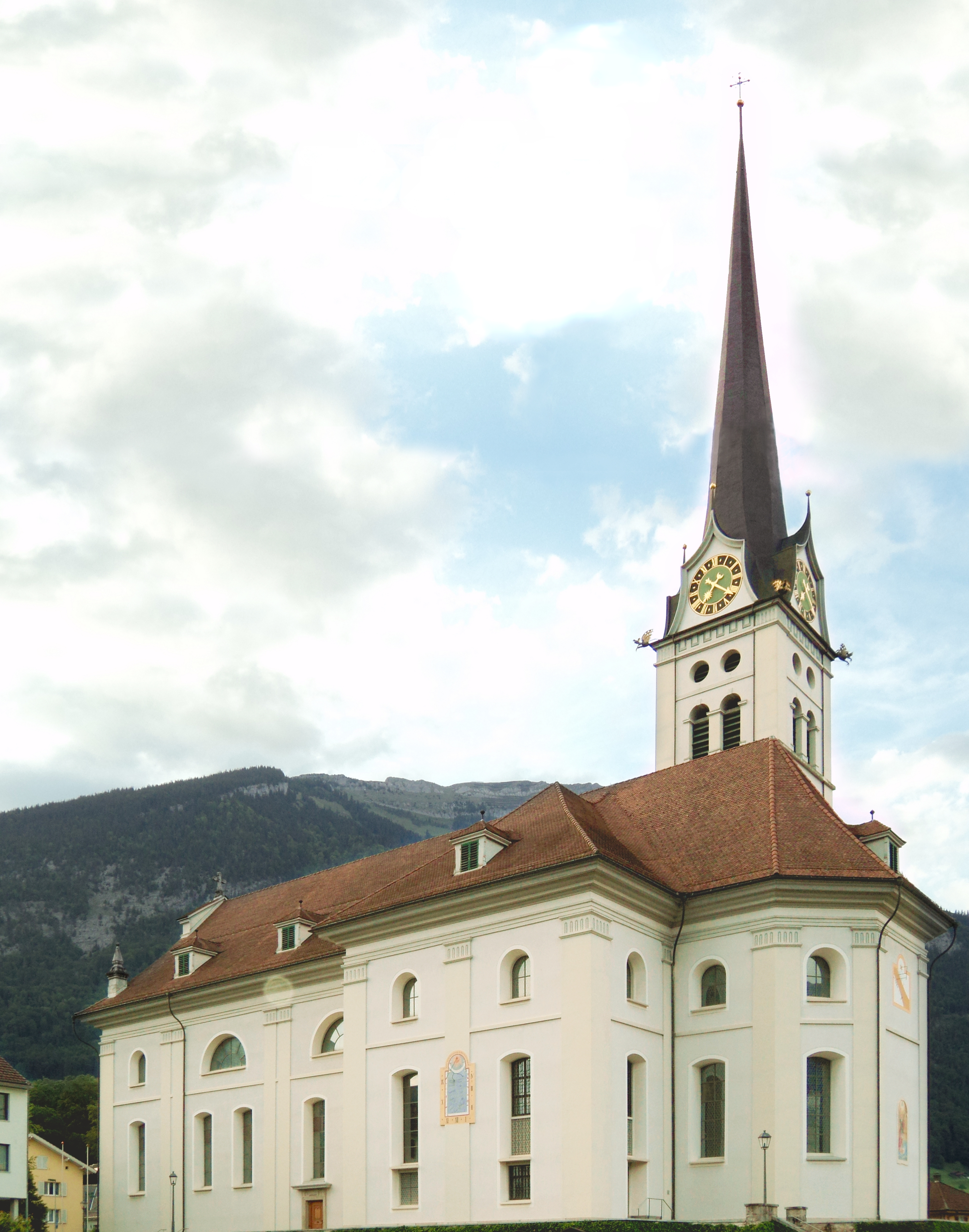 Pfarrkirche Alpnach 2011